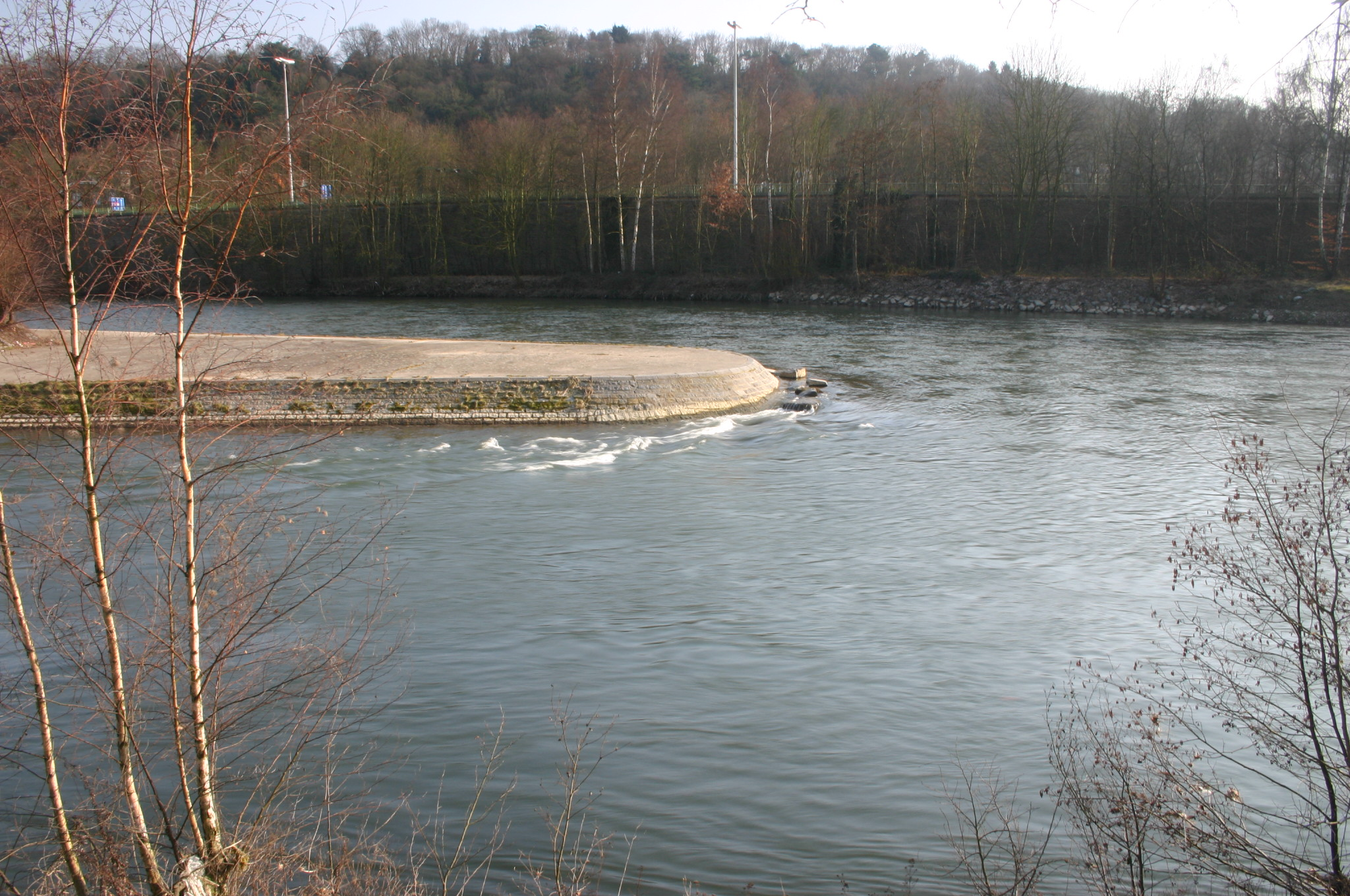 De Kapp op der Afahrt an de Schleisekanal.